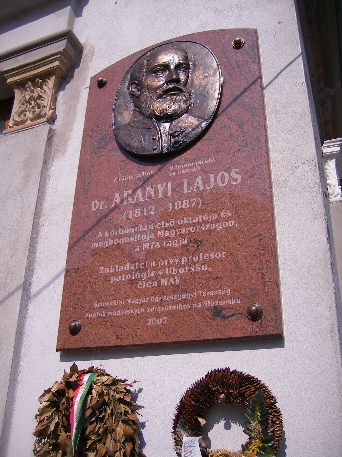 Komárom - Arányi Lajos 2008-ban felavatott emléktáblája a Klapka-tér és a Vársor-utca sarkán